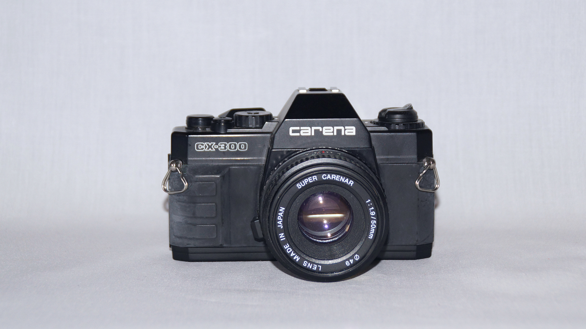 Carena CX 300 sold by Photo Porst and Interdiscount - produced by Cosina - Foto Wolfgang Pehlemann DSC04884